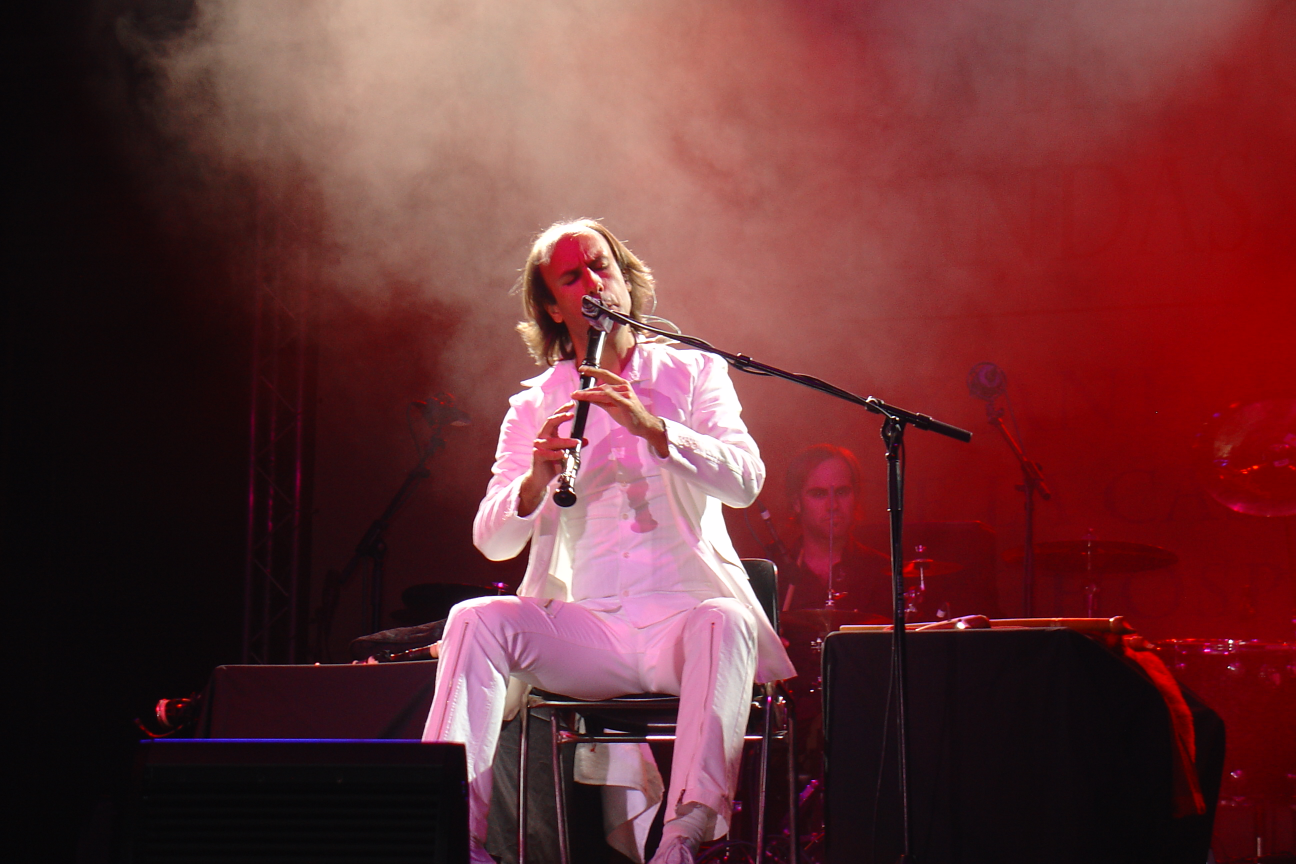 Actuación de Carlos Núñez en La Farga de L'Hospitalet (BCN)